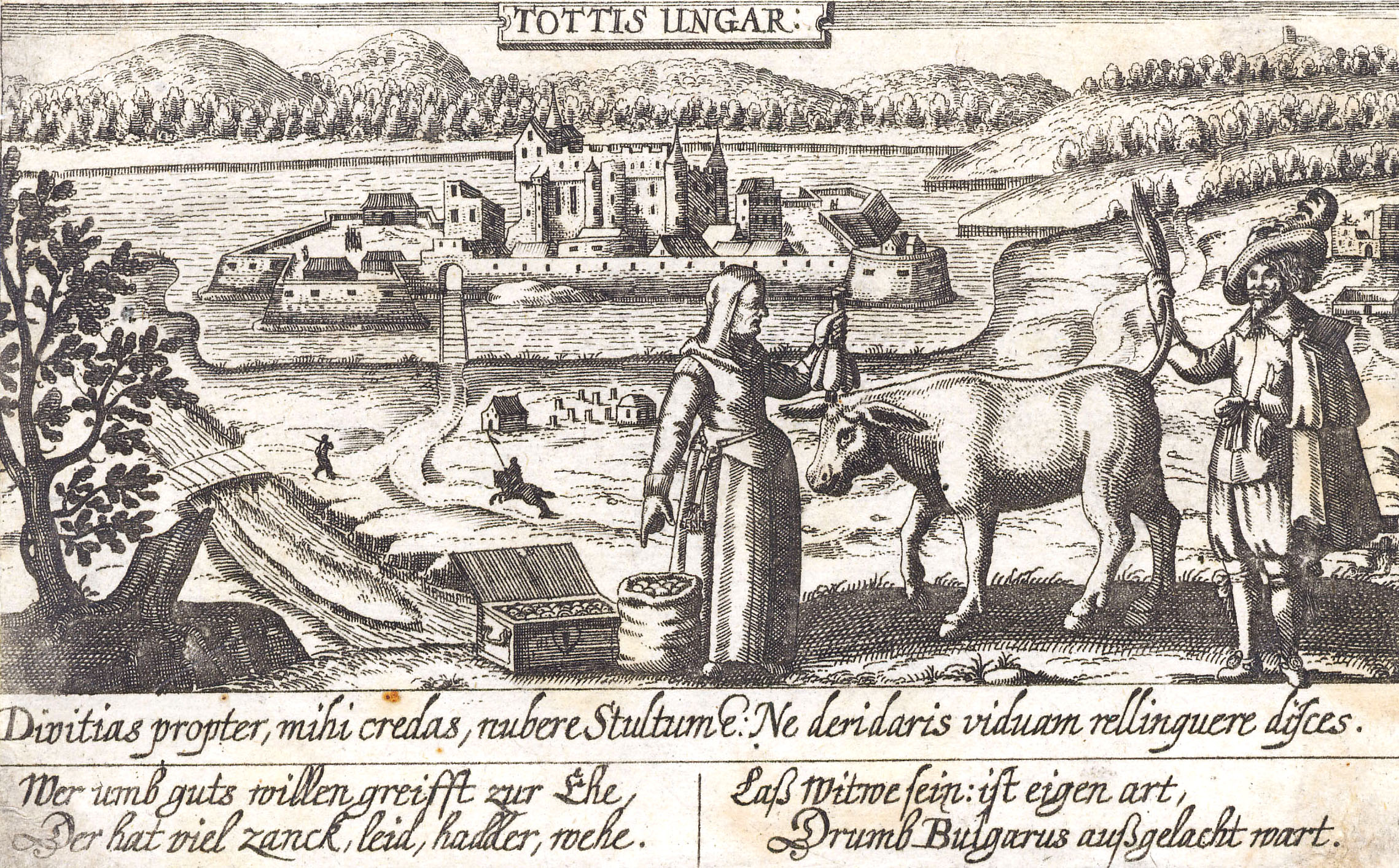 Tata 18. századi látképe Matthäus Merian rézmetszetén